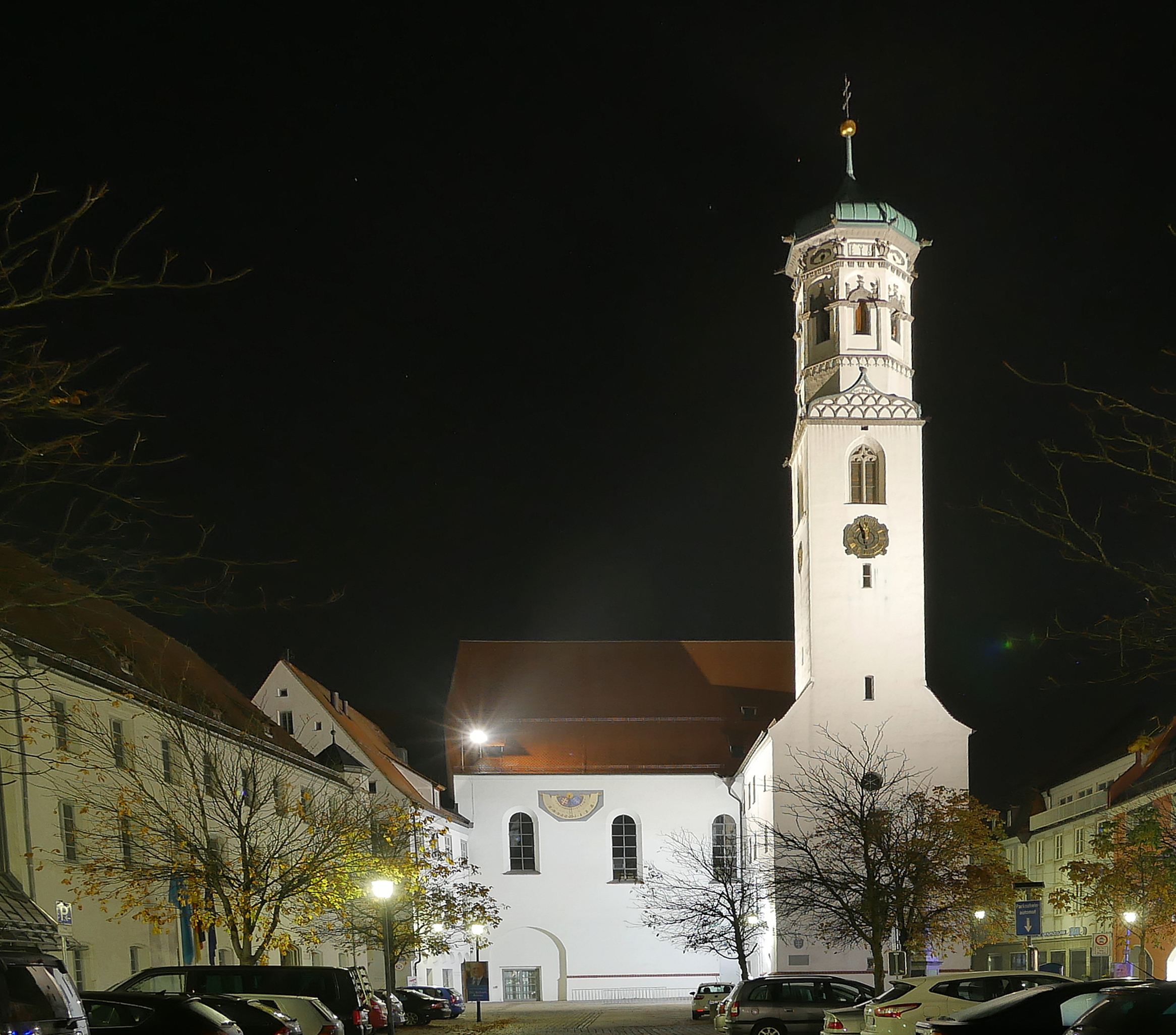 Ehemalige Kirche St. Peter und Paul des Kreuzherrenklosters Memmingen vom Hallhof aus